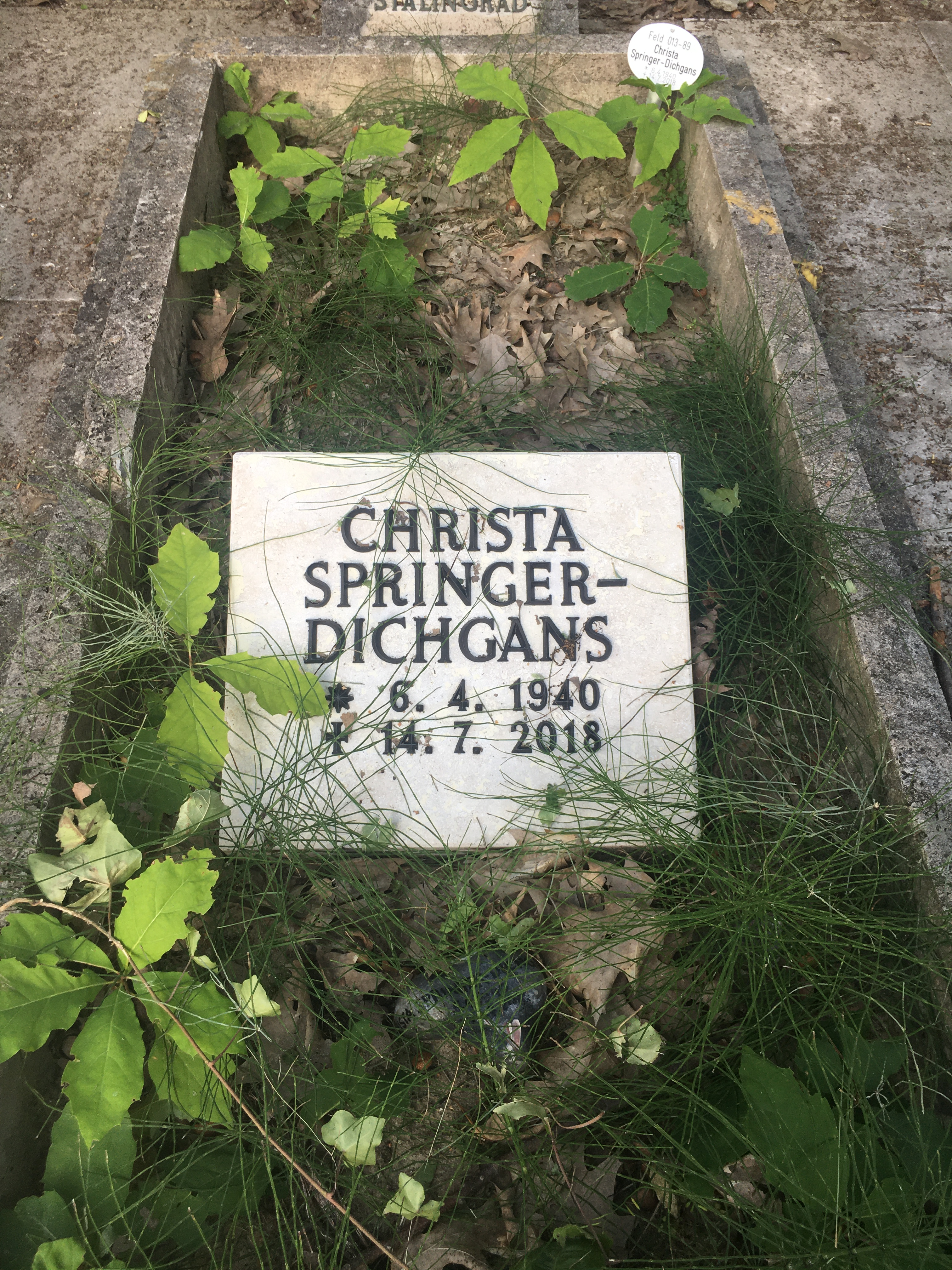 Grabstätte Christa Springer-Dichgans